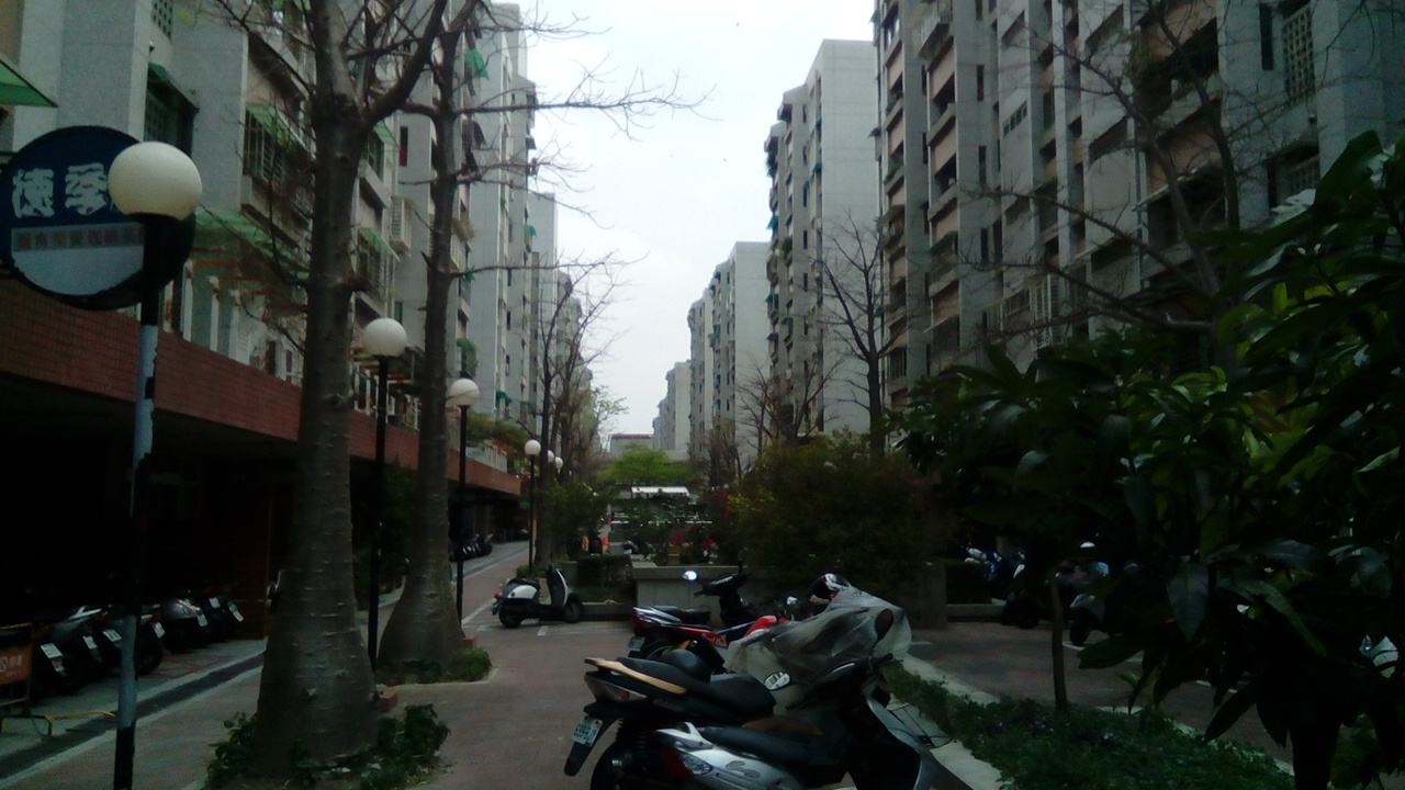 鹽水區台灣詩路剪影